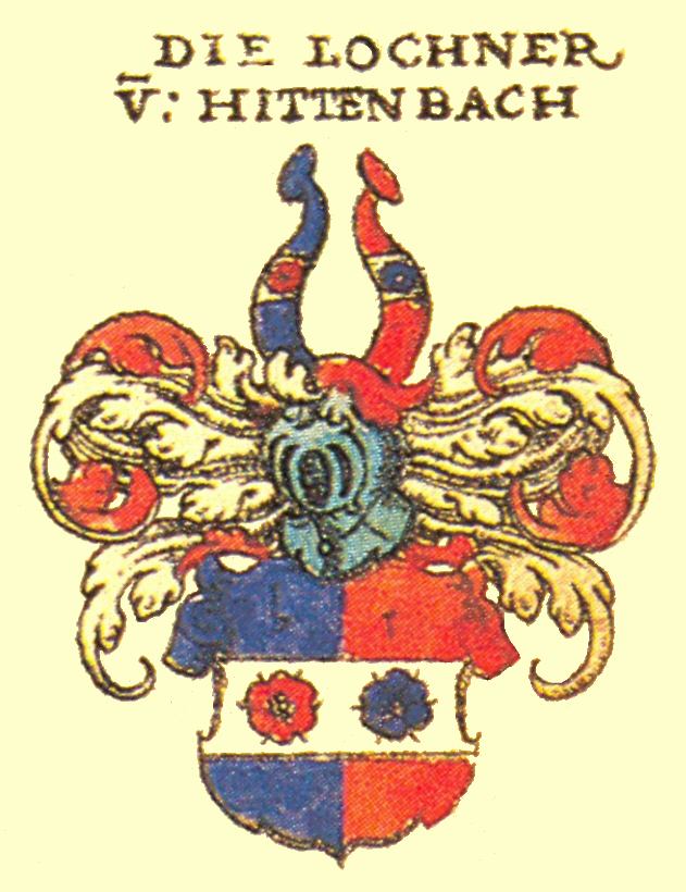 Wappen der fränkischen Adelsfamilie der Lochner von Hüttenbach.